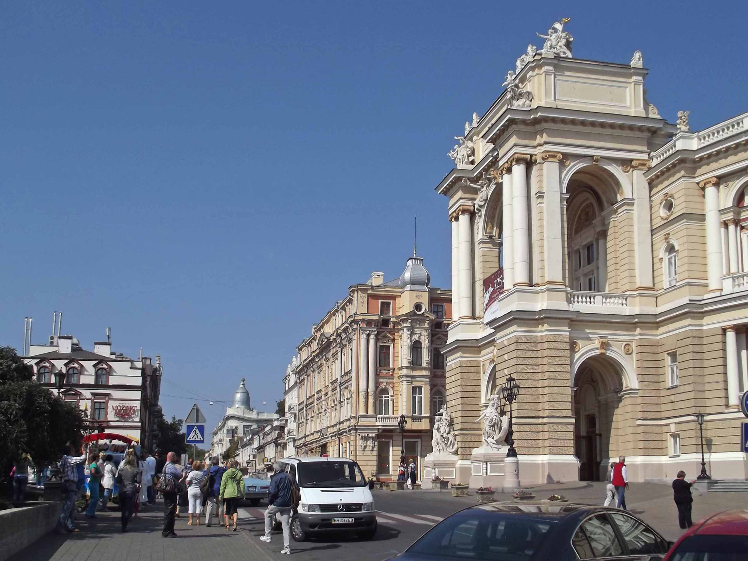 Вид на Ланжероновскую улицу